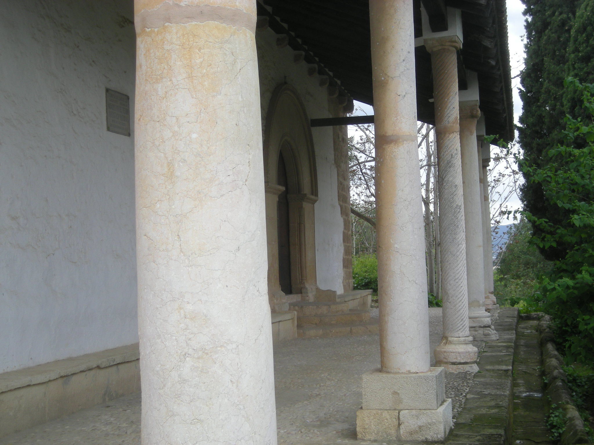 Pòrtic de l'església de Sant Feliu de Xàtiva (segle XIII).